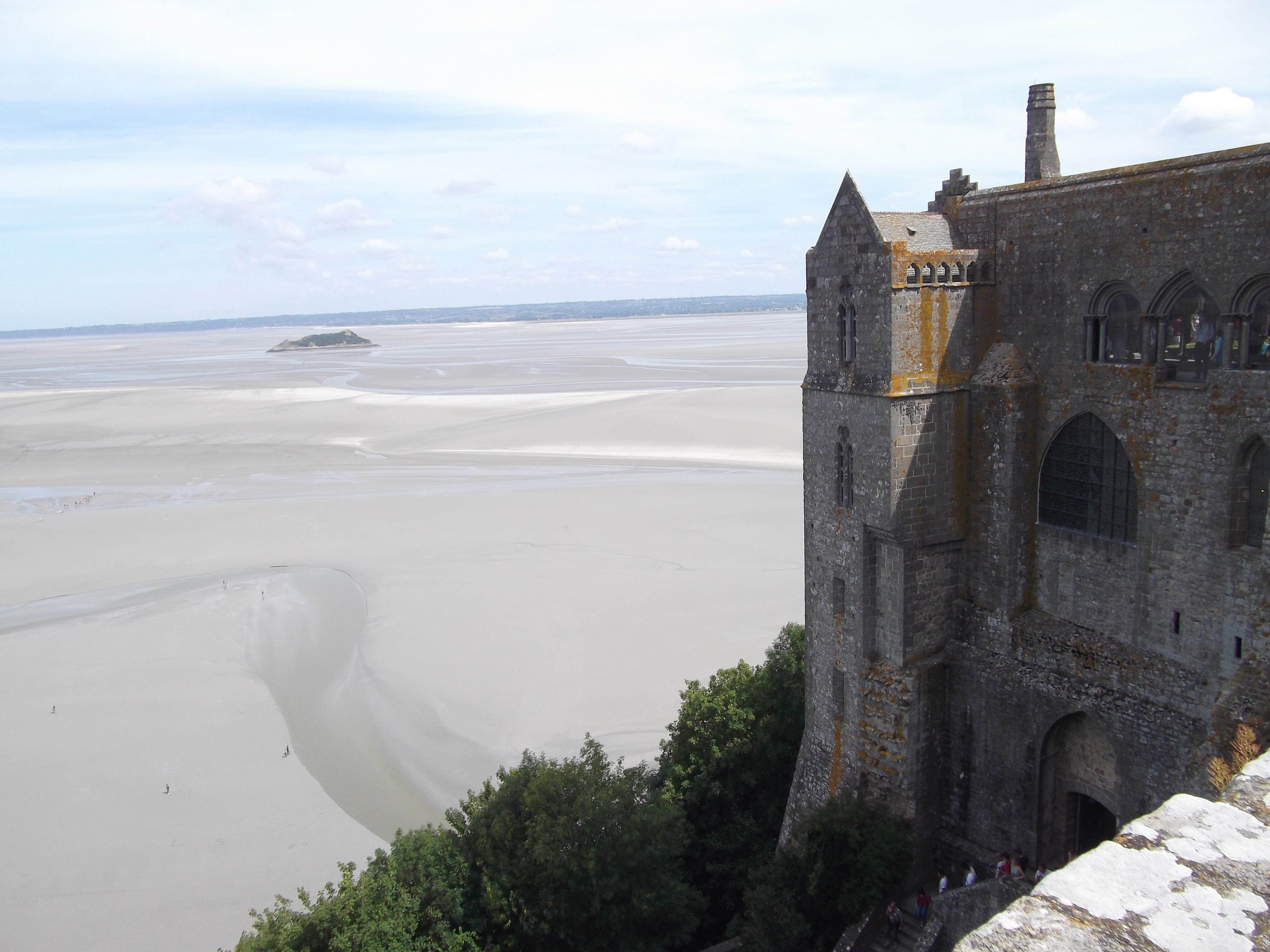 Blick vom Kreuzgang der Abtei Mont-Saint-Michel, Frankreich in die Bucht